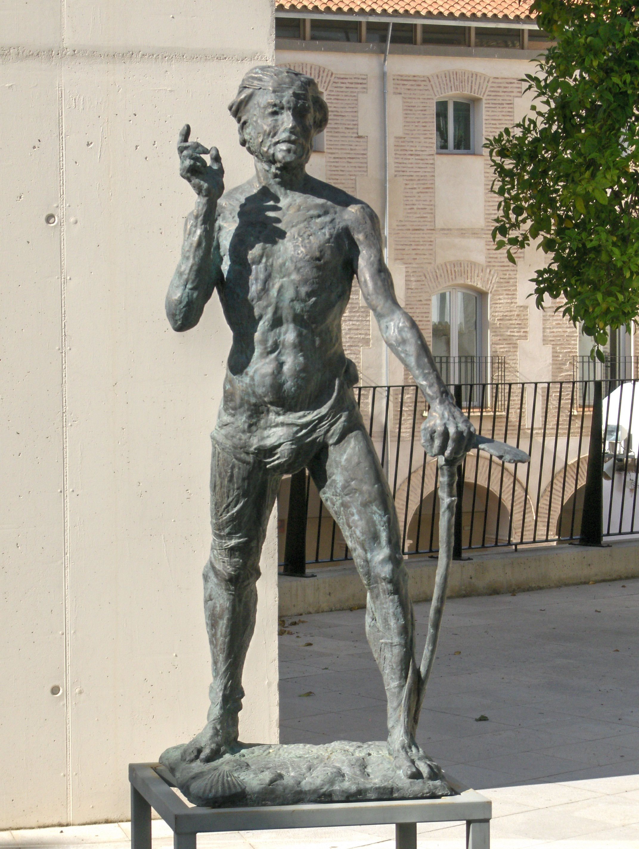 Monumento al jornalero en Archidona, España.